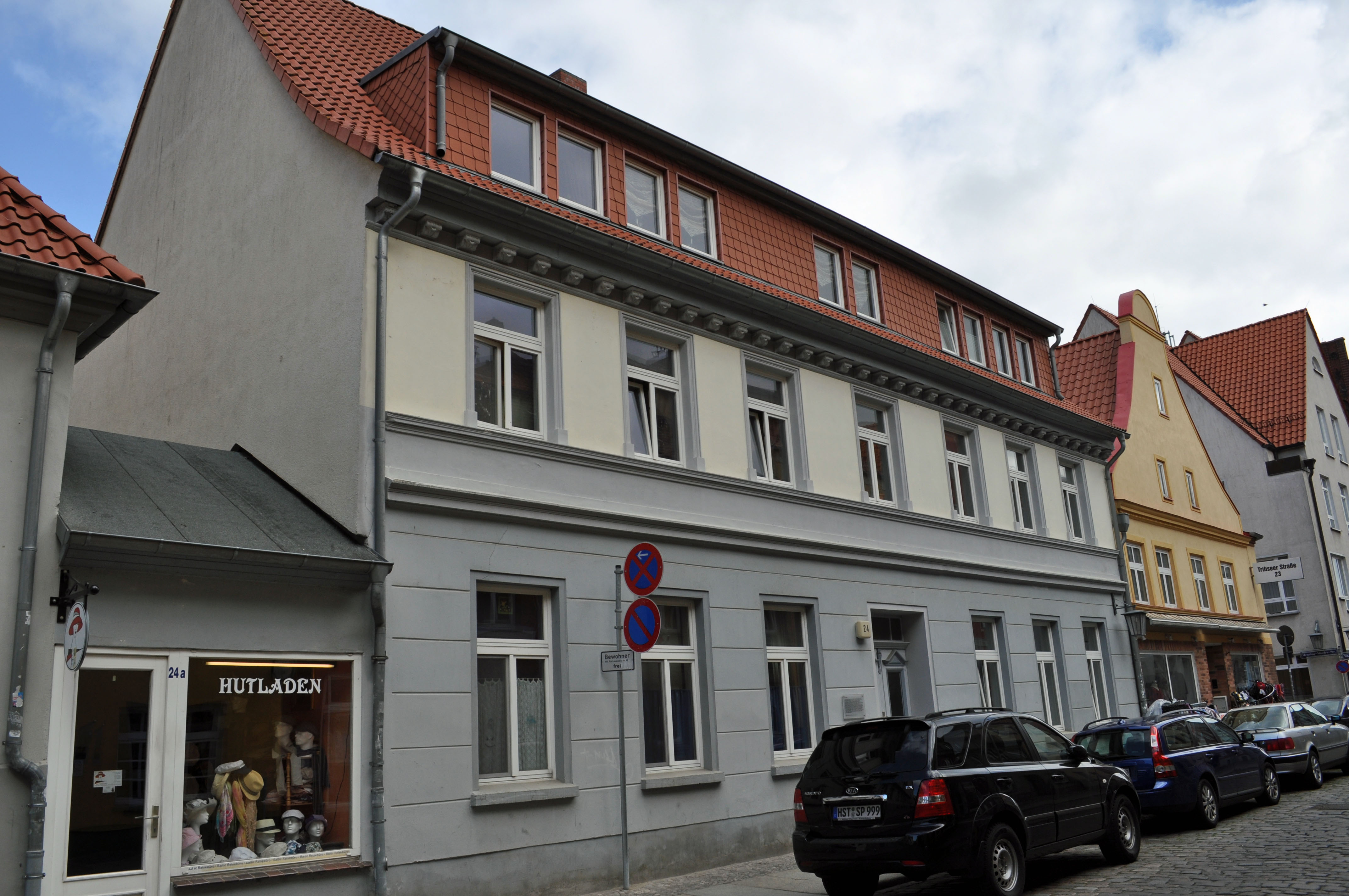 Gebäude in Stralsund, siehe Dateiname